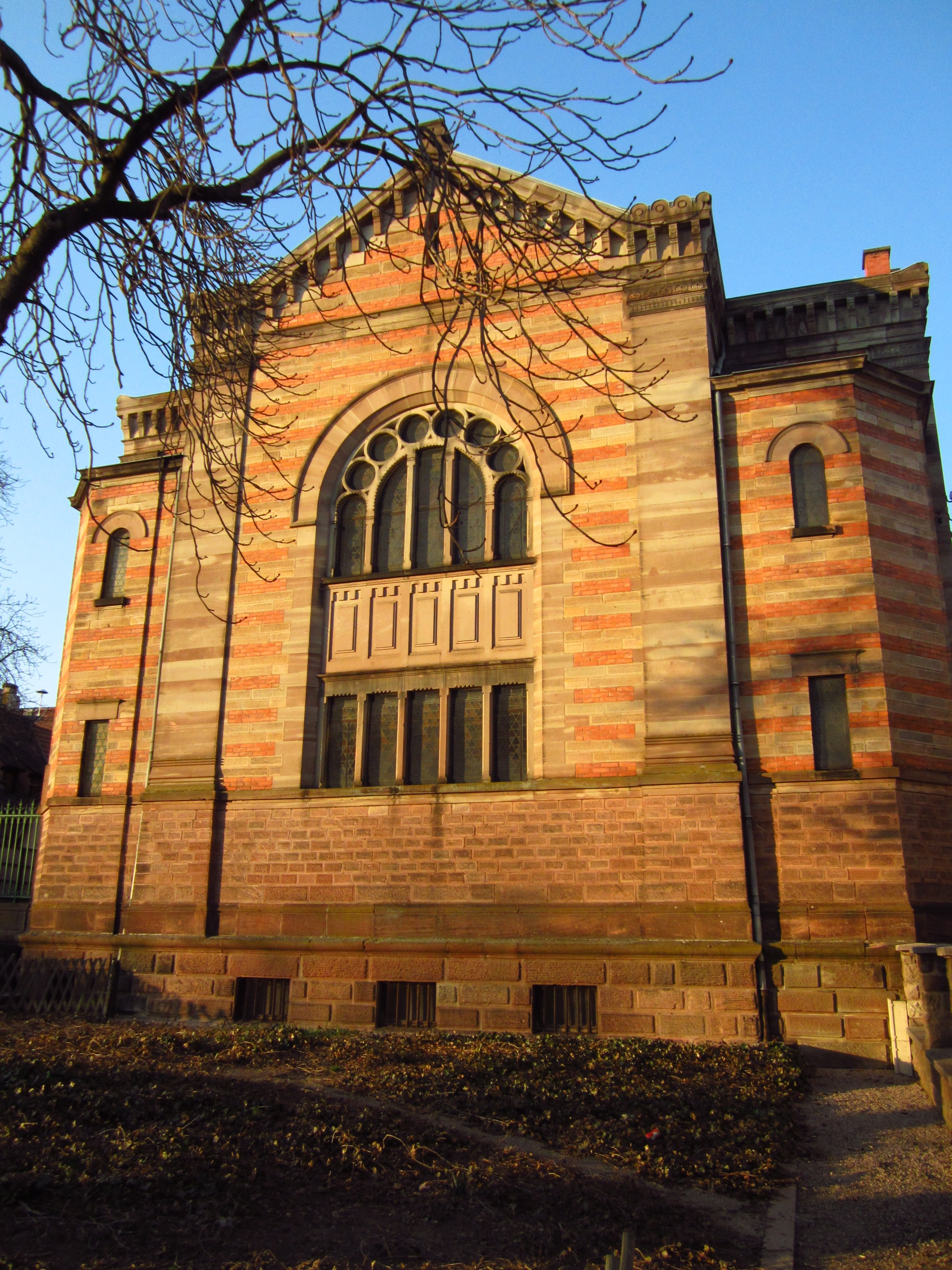 Synagogue